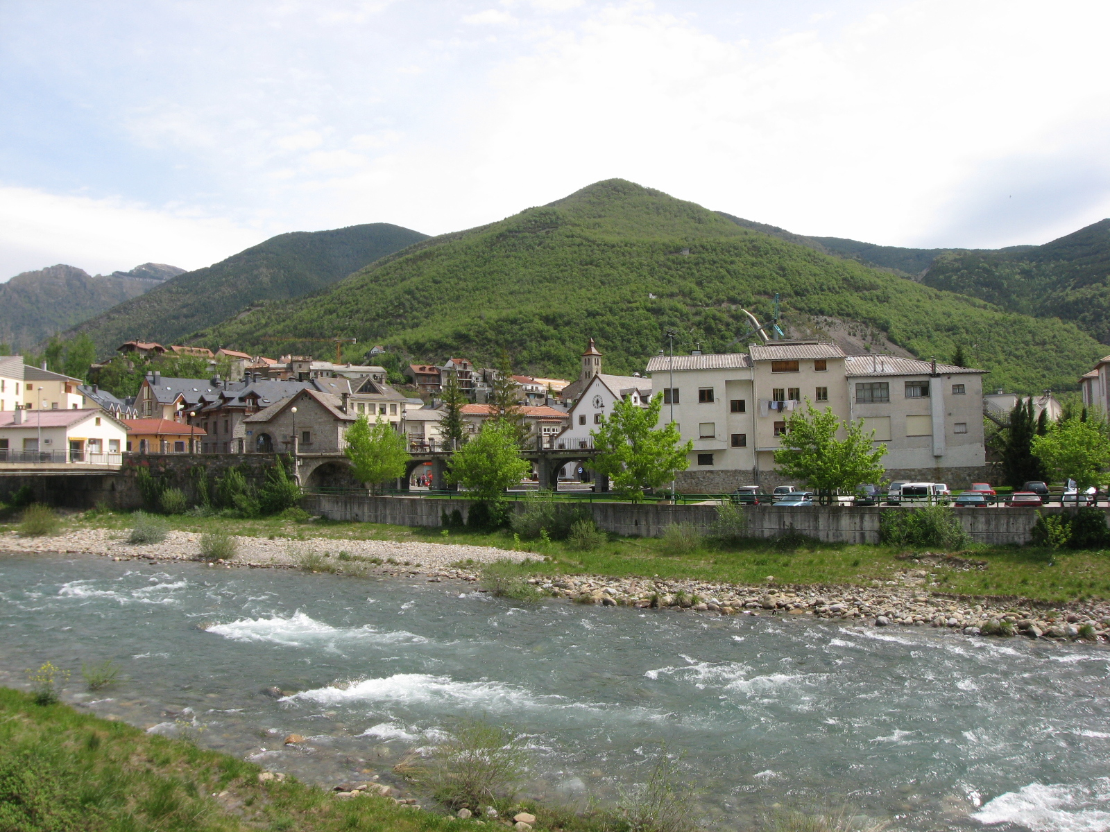 Rio Gallego à Biescas Aragon (Espagne).